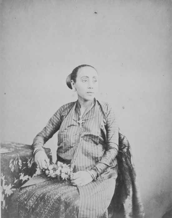 Foto. Portret van de vrouw van de Pangeran Adipati van Bangkalan